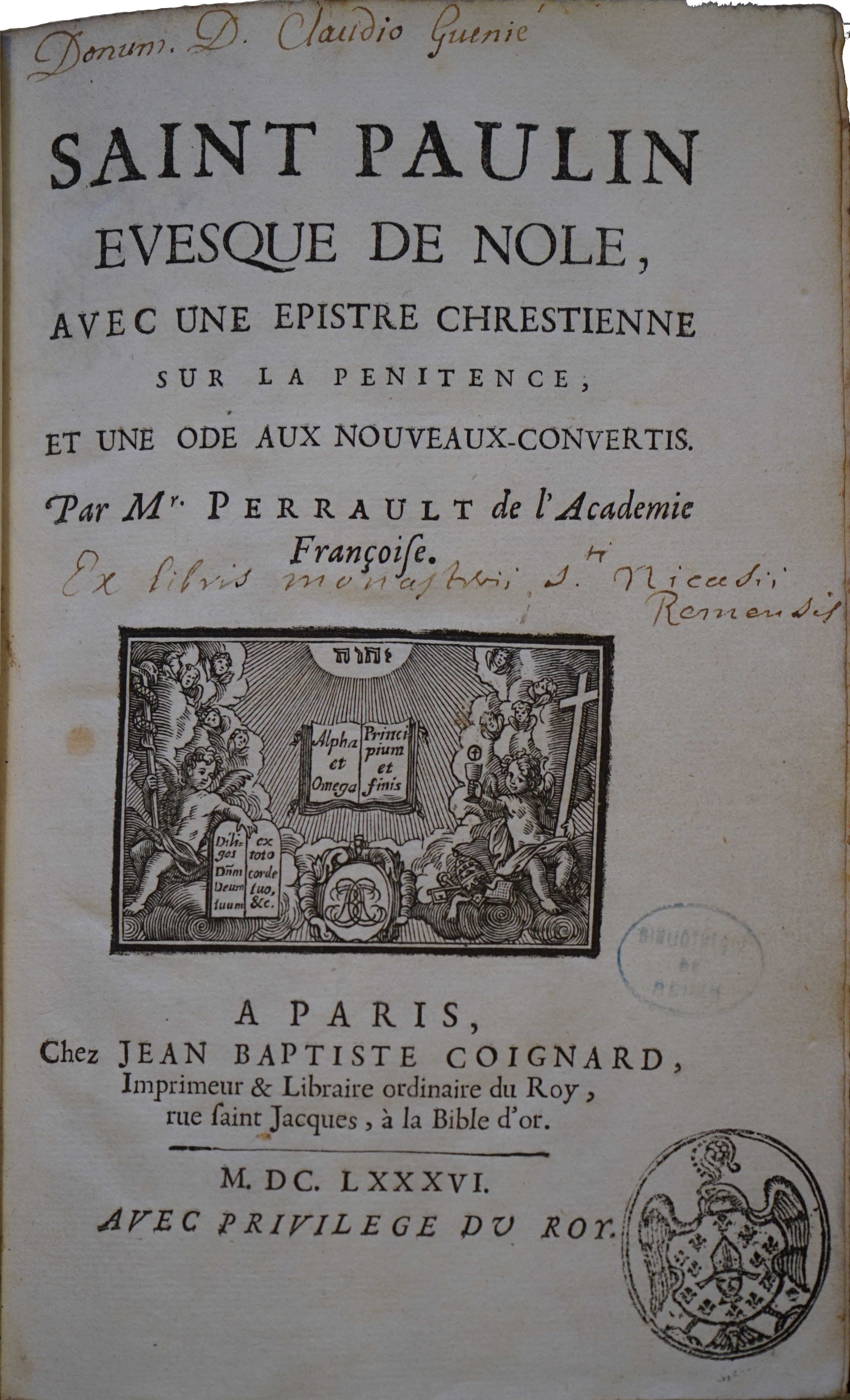 ex-libris extrait d'un livre de la bibliothèque de st-Nicaise. Imprimé par Jean-Baptiste Coignard à Paris.